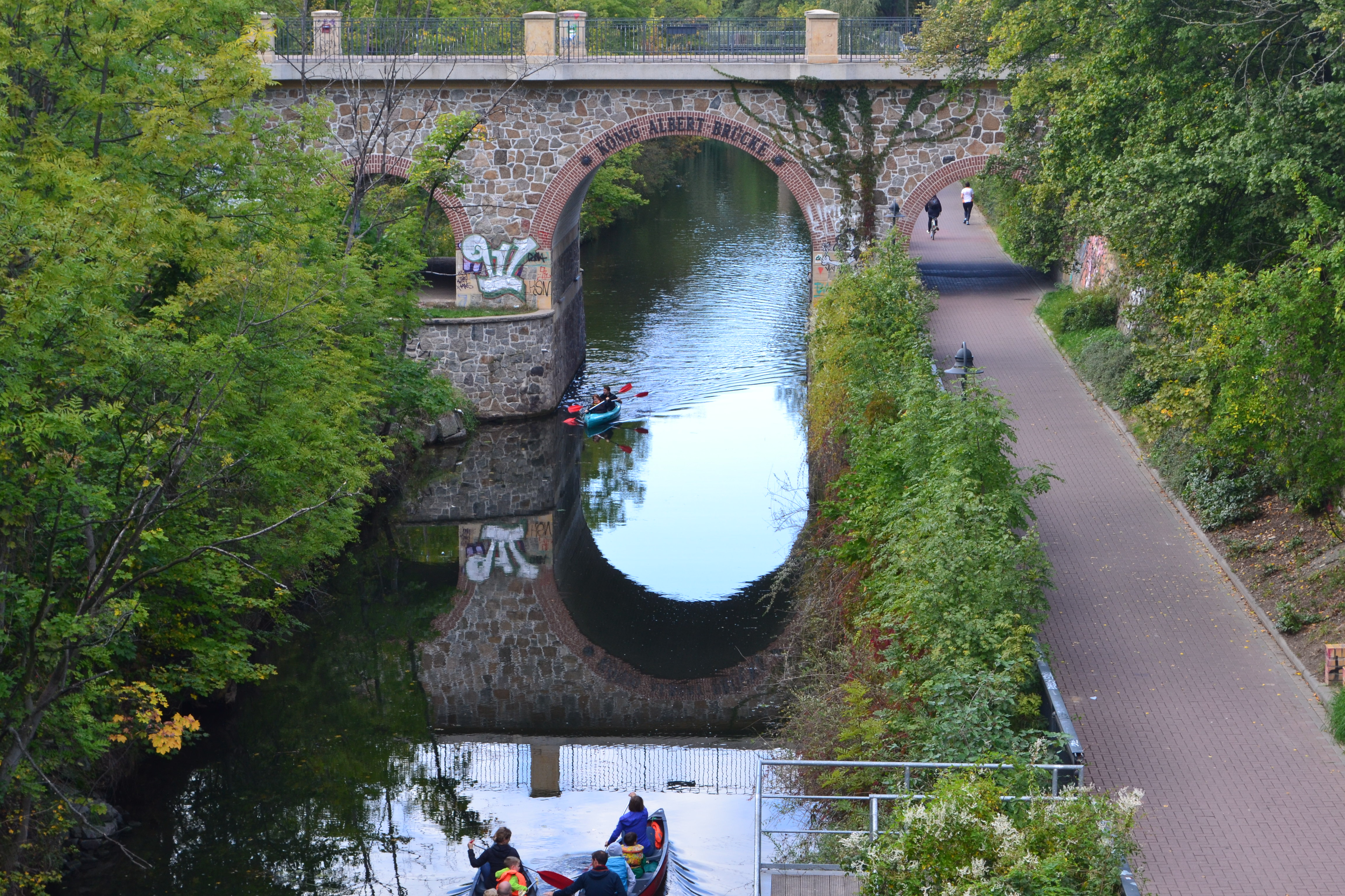 Straßenbrücke (König-Albert-Brücke) mit eisernem Gitter und Einfriedung zum Karl-Heine-Kanal; hoher wissenschaftlicher Wert als Dokument der Technik- und Stadtgeschichte, Bestandteil der Gesamtanlage Karl-Heine-Kanal